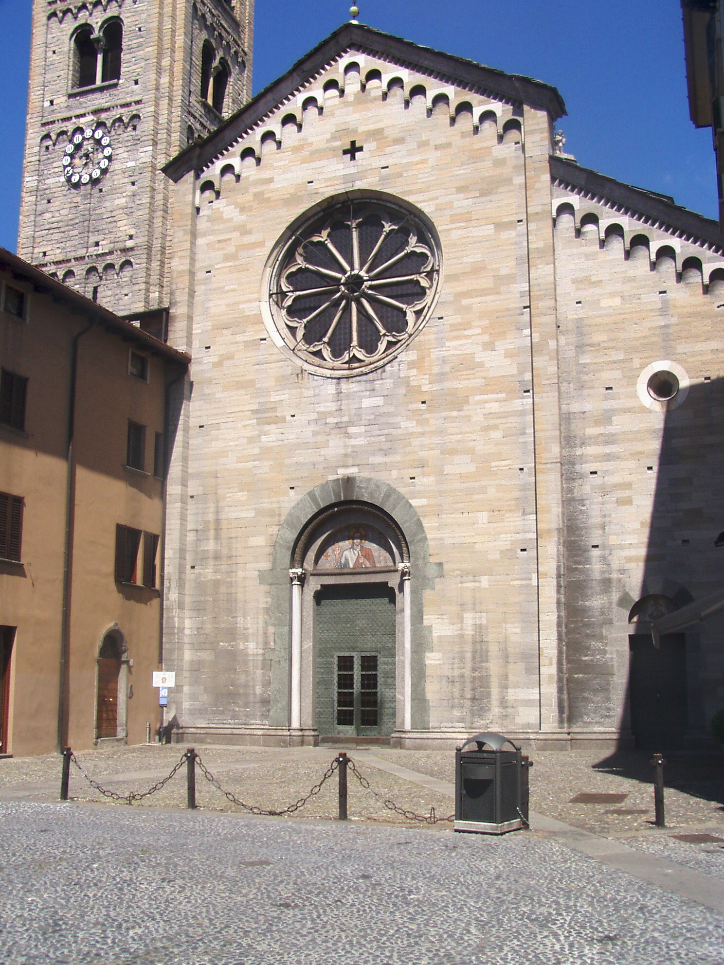 Facciata della Basilica di San Fedele a Como.